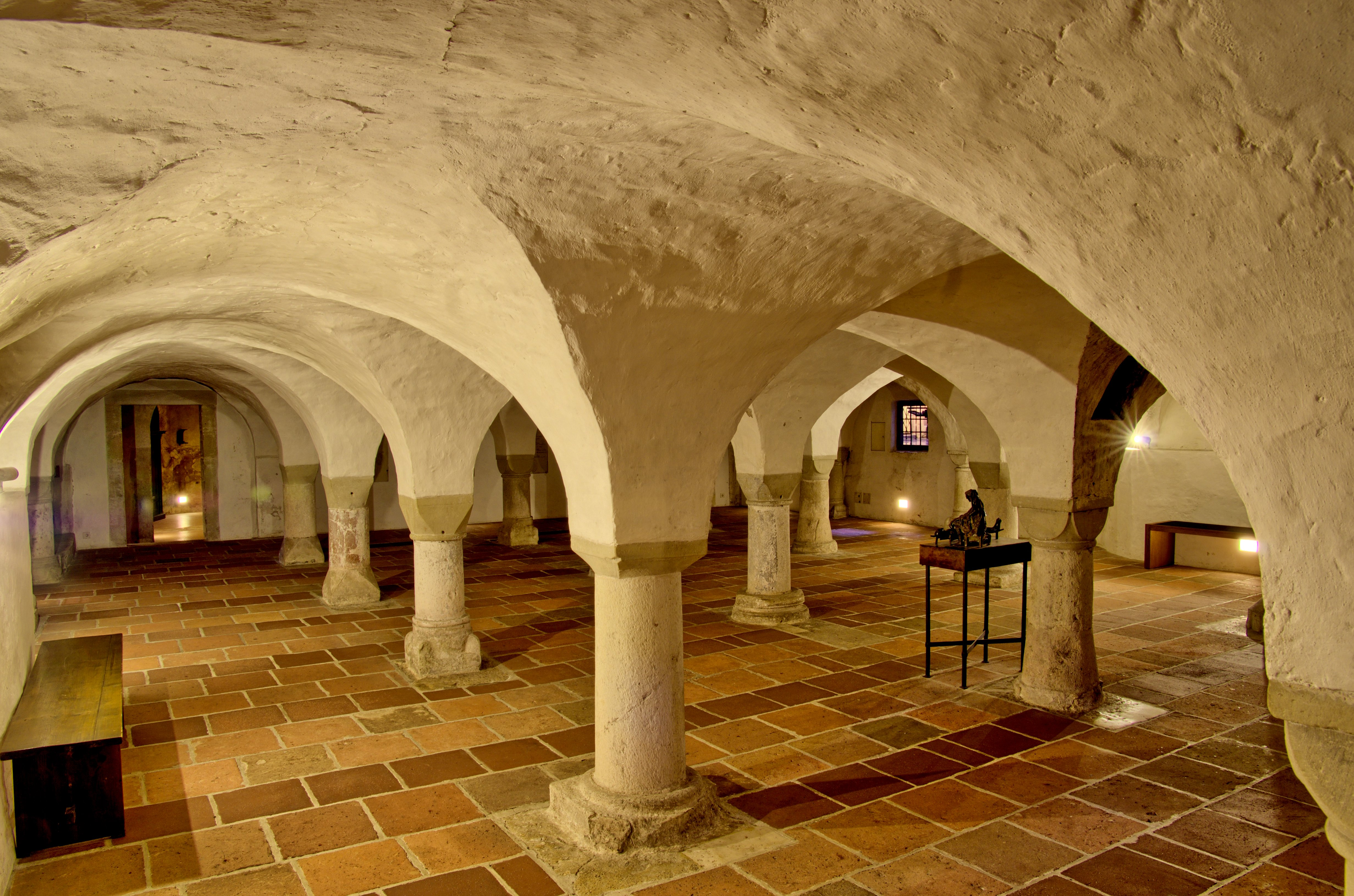 Bilder aus dem Augsburger Dom